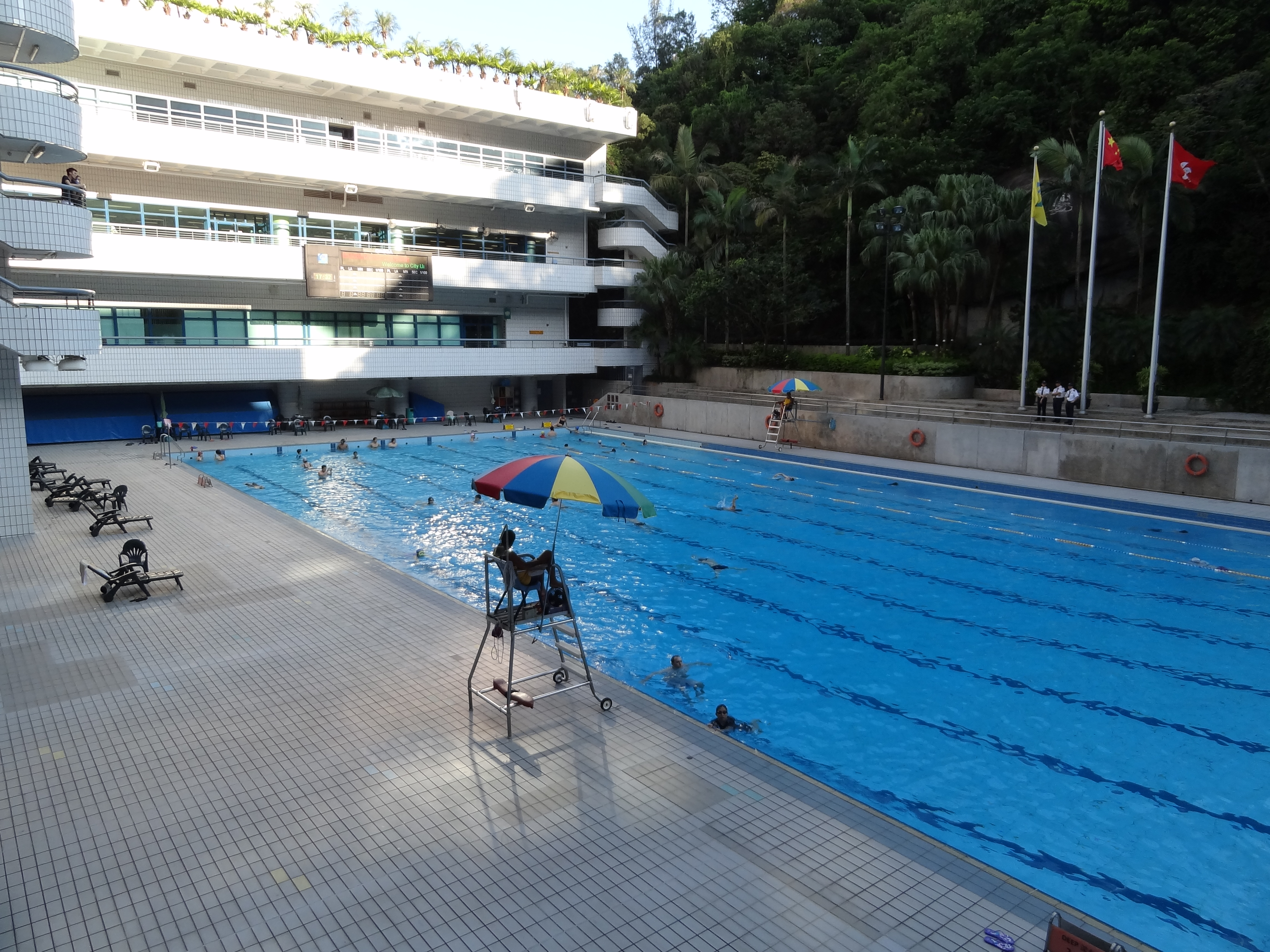 홍콩 시립대학교 수영장